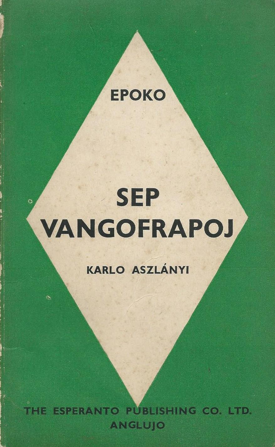 kovrilo de "Sep Vangofrapoj", 1943